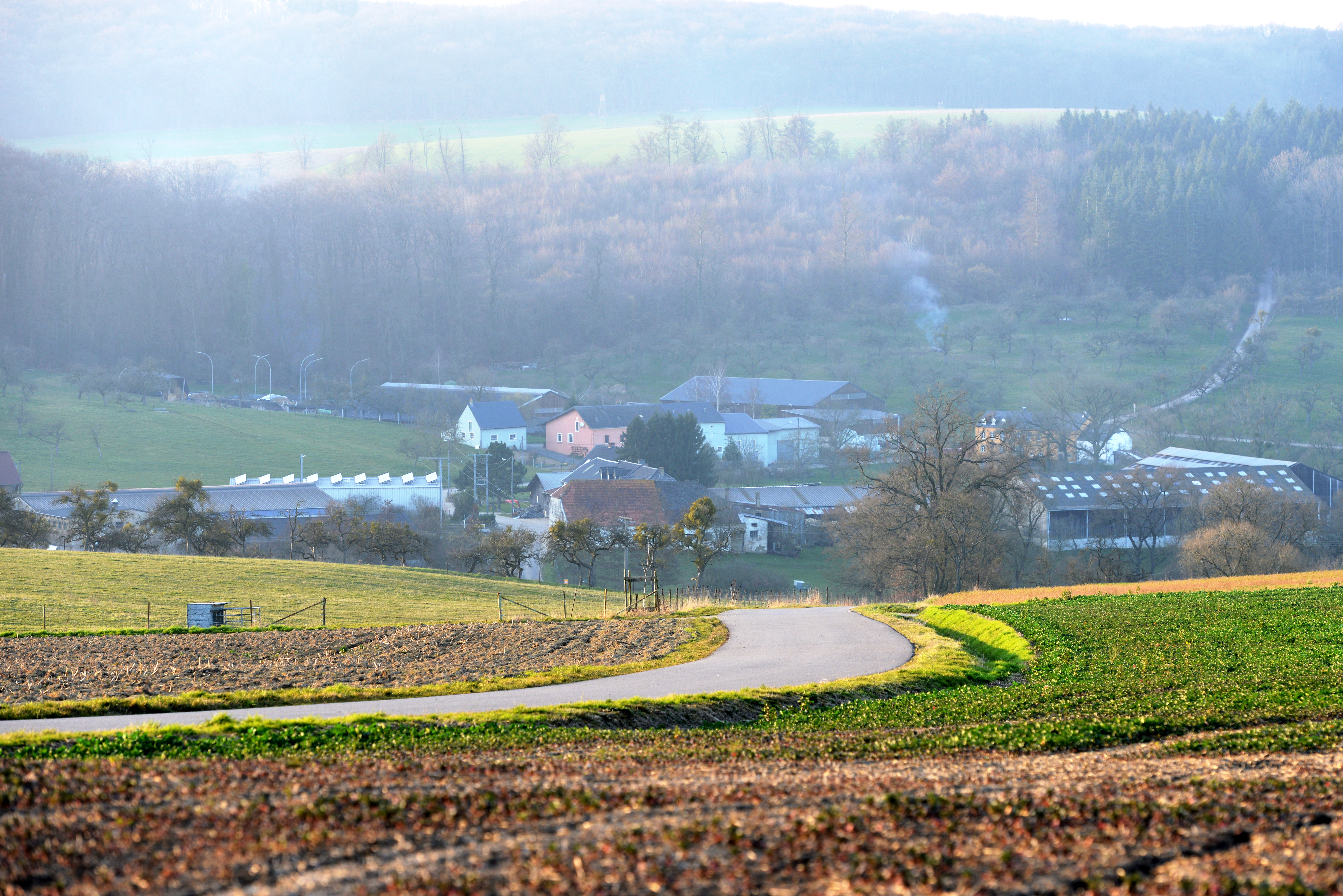 Vue op Buerschdref.